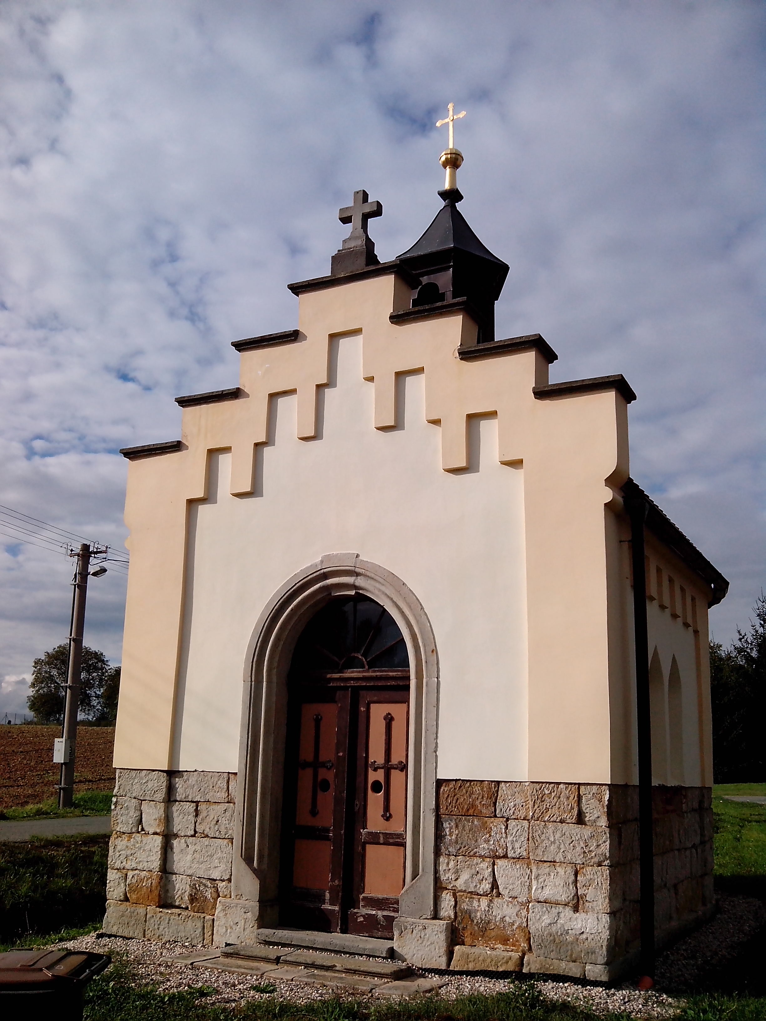 Nouzov - kaple